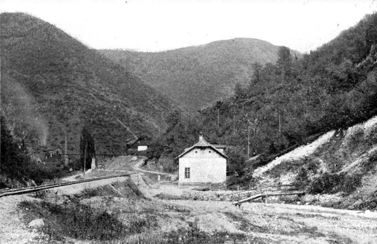 A Govasdiai villanyos erőátviteli telep